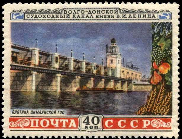 Почтовая марка СССР - Плотина Цимлянской ГЭС